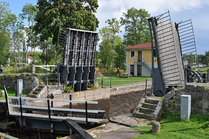 Sveriges äldsta järnbro (invigd 1813)vid Forsvik i Göta kanal, en handvevad klaffbro som användes till 1956 då en ny motoriserad klaffbro byggdes vid den övre slussporten mot sjön Viken. Ritningar till bron uppgjordes ursprungligen 1810 av Thomas Telford för Forth och Clyde Canal i Skottland.